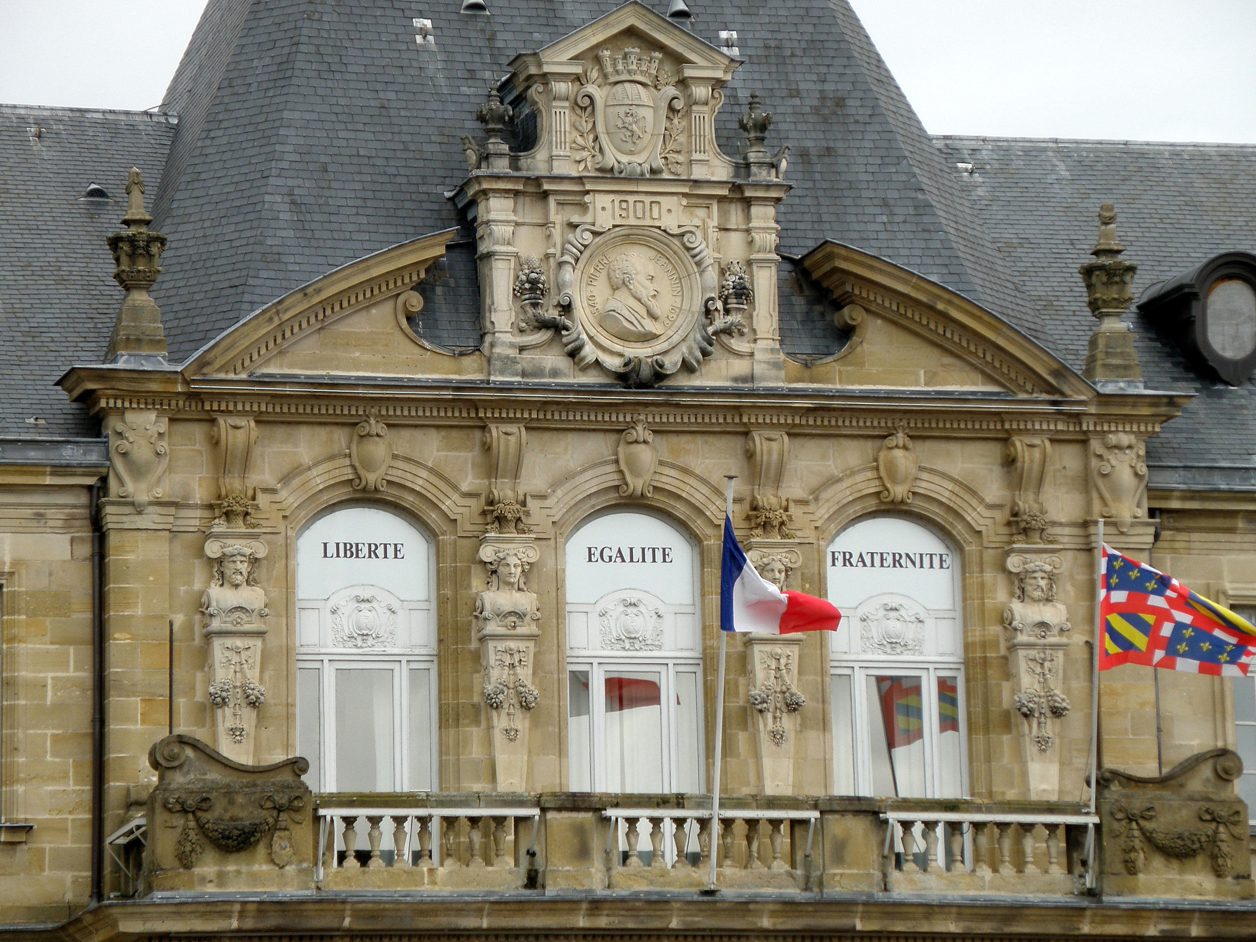 Autun (Saône-et-Loire, Bourgogne, France). Hôtel de ville.